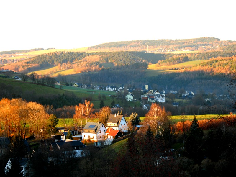 Pöhla, Blick vom Wasserwerk auf den unteren Ortsteil. Im Hintergrund die Kirche von Grünstädtel. Am Horizont der Spiegelwaldturm / Pöhla, view from waterworks towards lower part of village. Church of Grünstädtel in background. Spiegelwald Tower at horizon